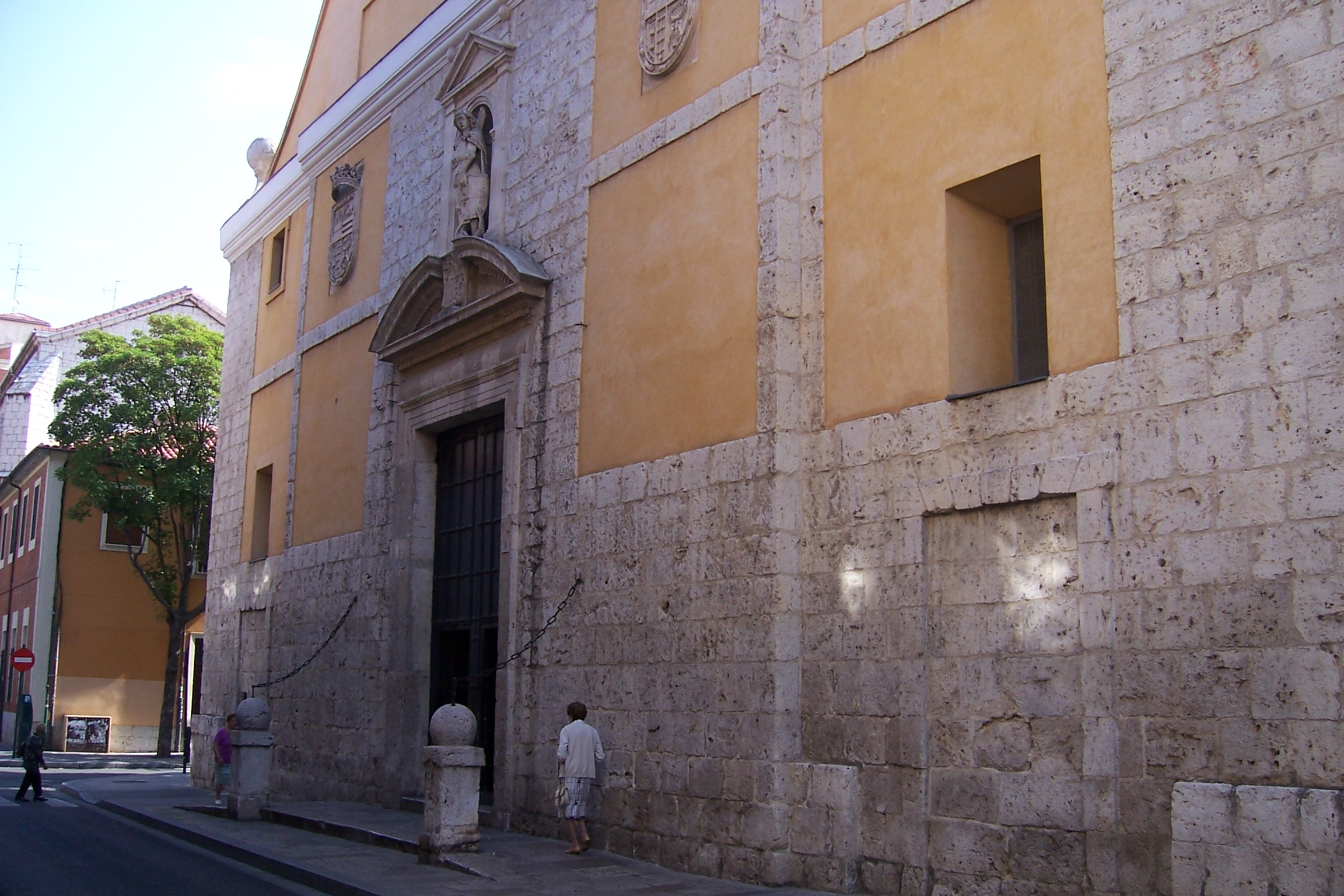 Valladolid, iglesia de San Miguel y San Julián. El edificio perteneció a los jesuitas hasta su expulsión. En el siglo XVIII se trajeron a este templo los objetos litúrgicos de las dos primeras parroquias que tuvo Valladolid llamadas San Julián y San Miguel ya desaparecidas.